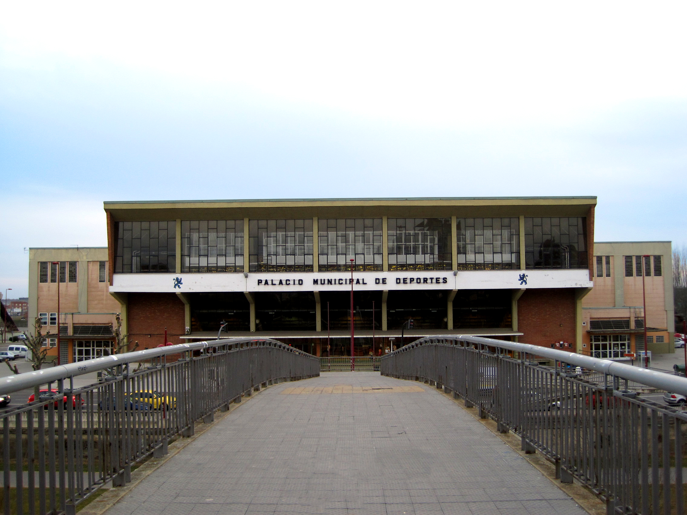 Vista frontal del Palacio Municipal de Deportes, en León (España).